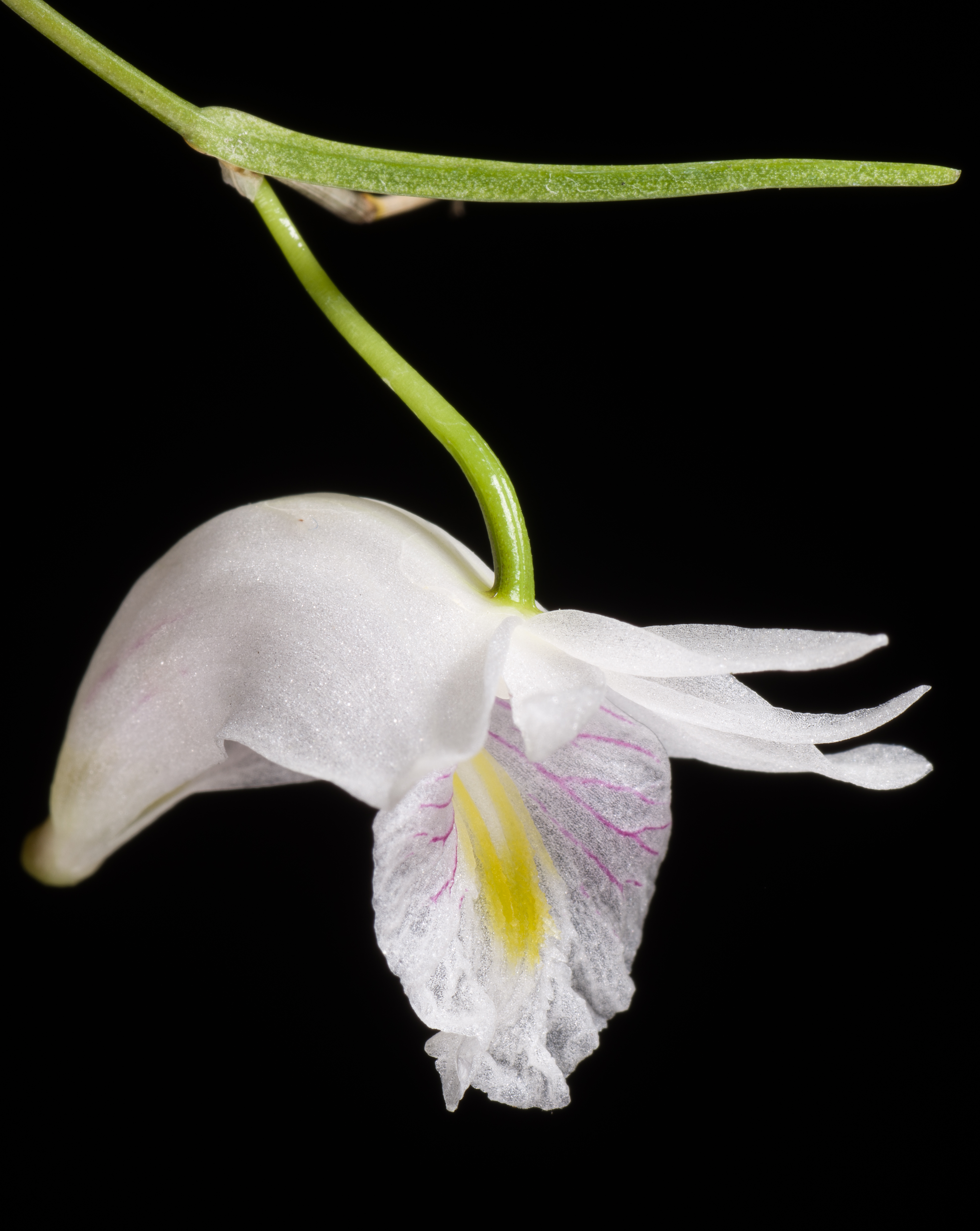 Dendrobium linearifolium - (Indonesia)